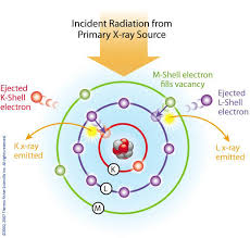 Emise fluorescenčního záření z různých slupek atomu (Thermo Fisher Scientific).